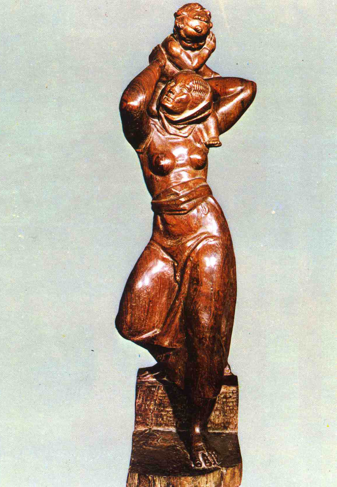 Juan Adsuara Maternidad Escultura